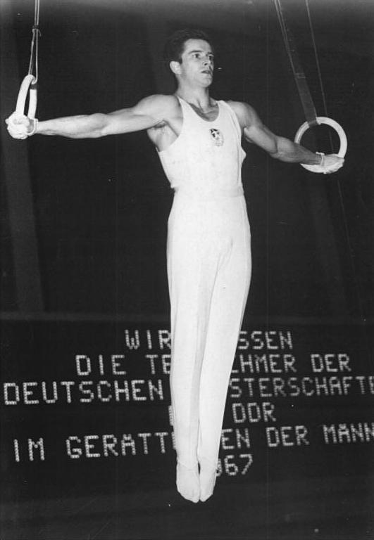 Siegfried Fülle Zentralbild Mittelstädt 10.12.67 Berlin: Deutsche Meisterschaften der DDR im Geräteturnen der Männer (9.-10.12.67). Bei den deutschen Turnmeisterschaften in der Dynamosporthalle liegt nach der Pflicht der Leipziger Siegfried Fülle (DHfK) mit 56,50 Punkten gemeinsam mit dem Potsdamer ASK-Sportler Peter Weber an erster Stelle. Siegfried Fülle zeigt hier einen vorbildlichen Kreuzhang an den Ringen.